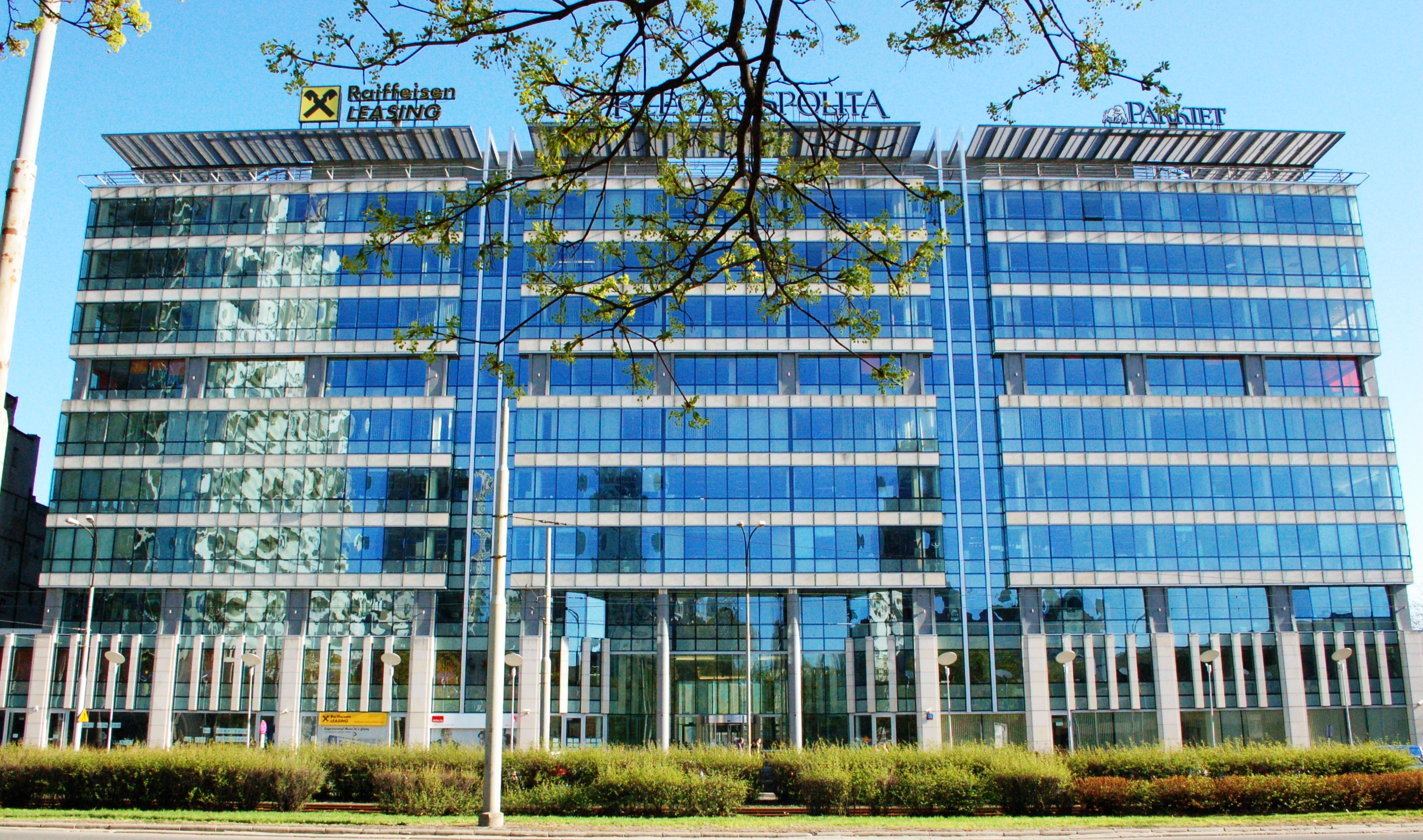 Warschau, Prosta Str